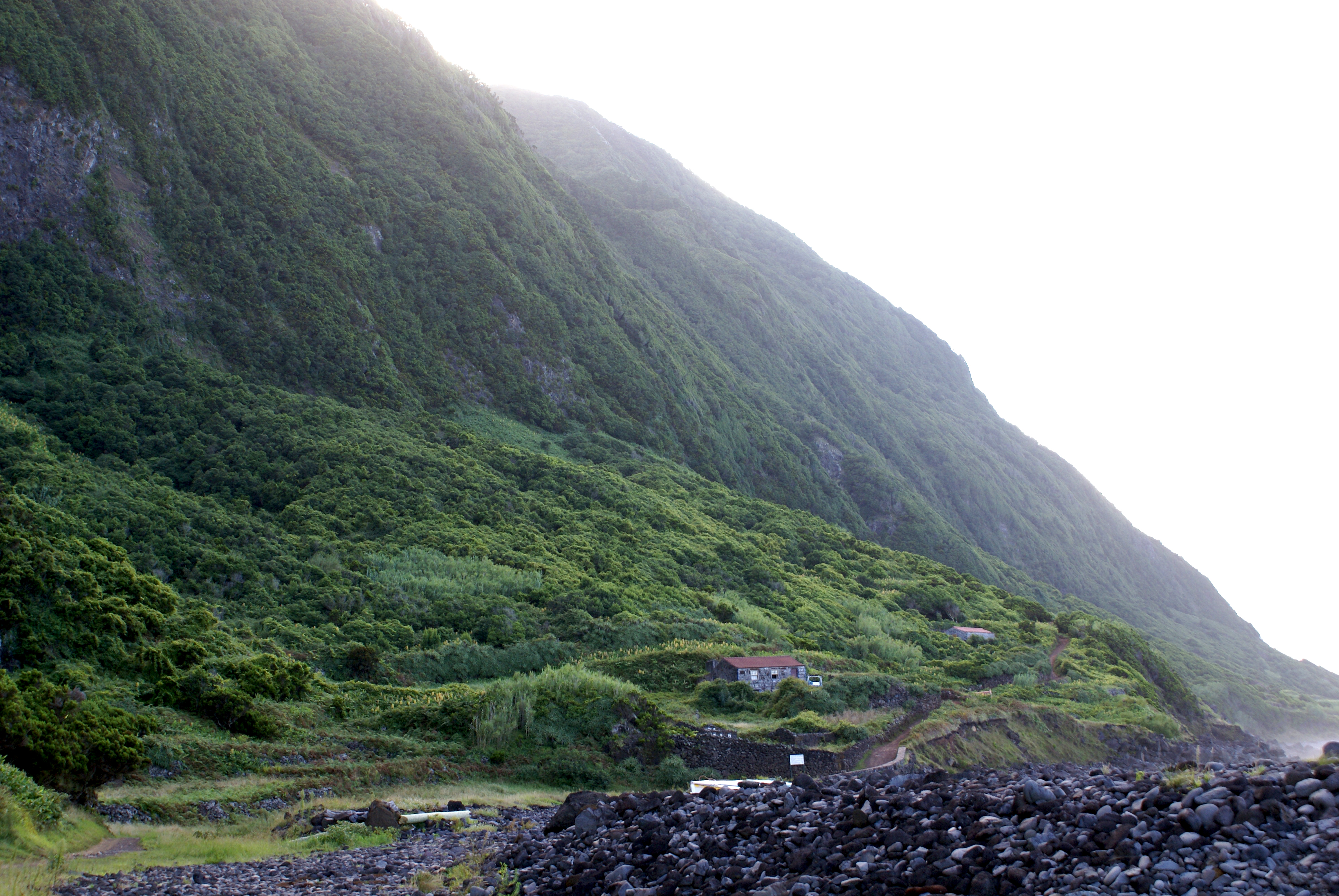 Fajã dos Tijolos, Inicio da Fajã e aspecto das falésias, Calheta, ilha de São Jorge, Açores